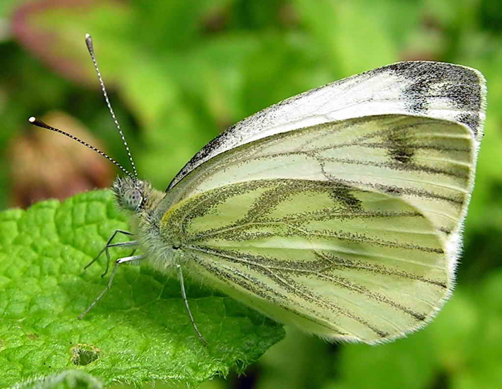 Foto tirada cunha Nikon E8800 en Bastabales Bastabales - Galicia - Spain